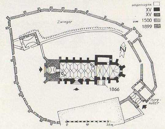 Planul fortificatiei din Bagaciu.